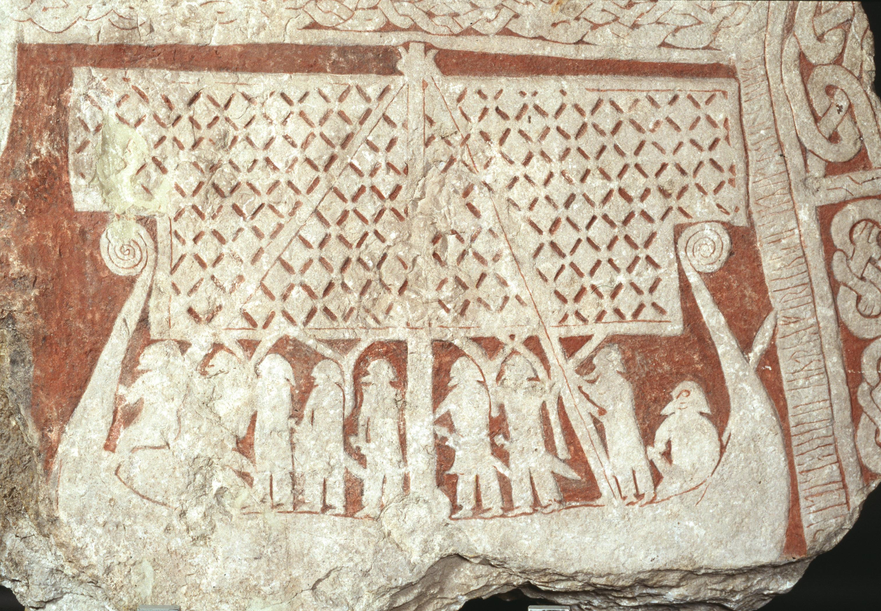 Detalj från bildsten med skepp 800-1099 Tjängvide, Gotland. Bild 22362